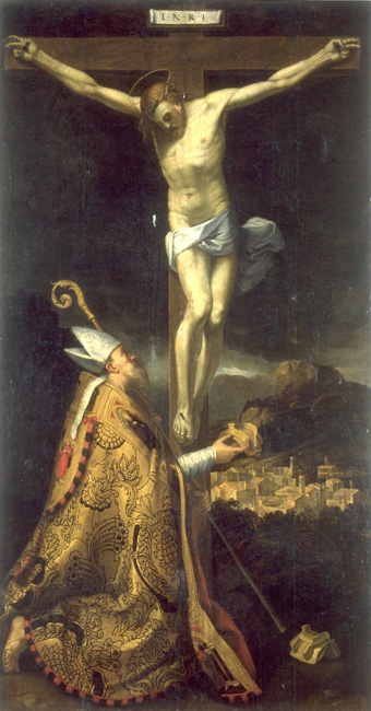 San Eligio obispo adorando a Cristo crucificado, San Giorgio Martire, Trecenta